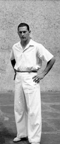 Miguel Gallastegui in 1942